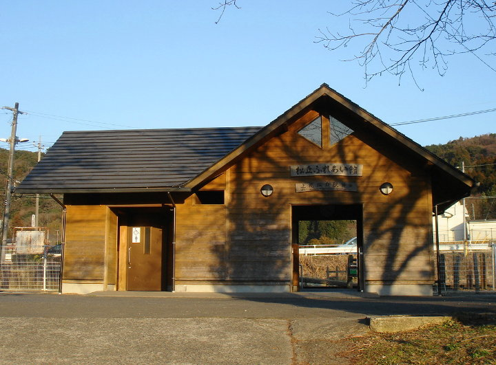 Kazusa-Matsuoka Station on the Kururi Line, Kimitsu, Chiba, Japan